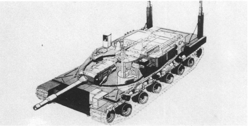 MBT-70 snorkel extended.